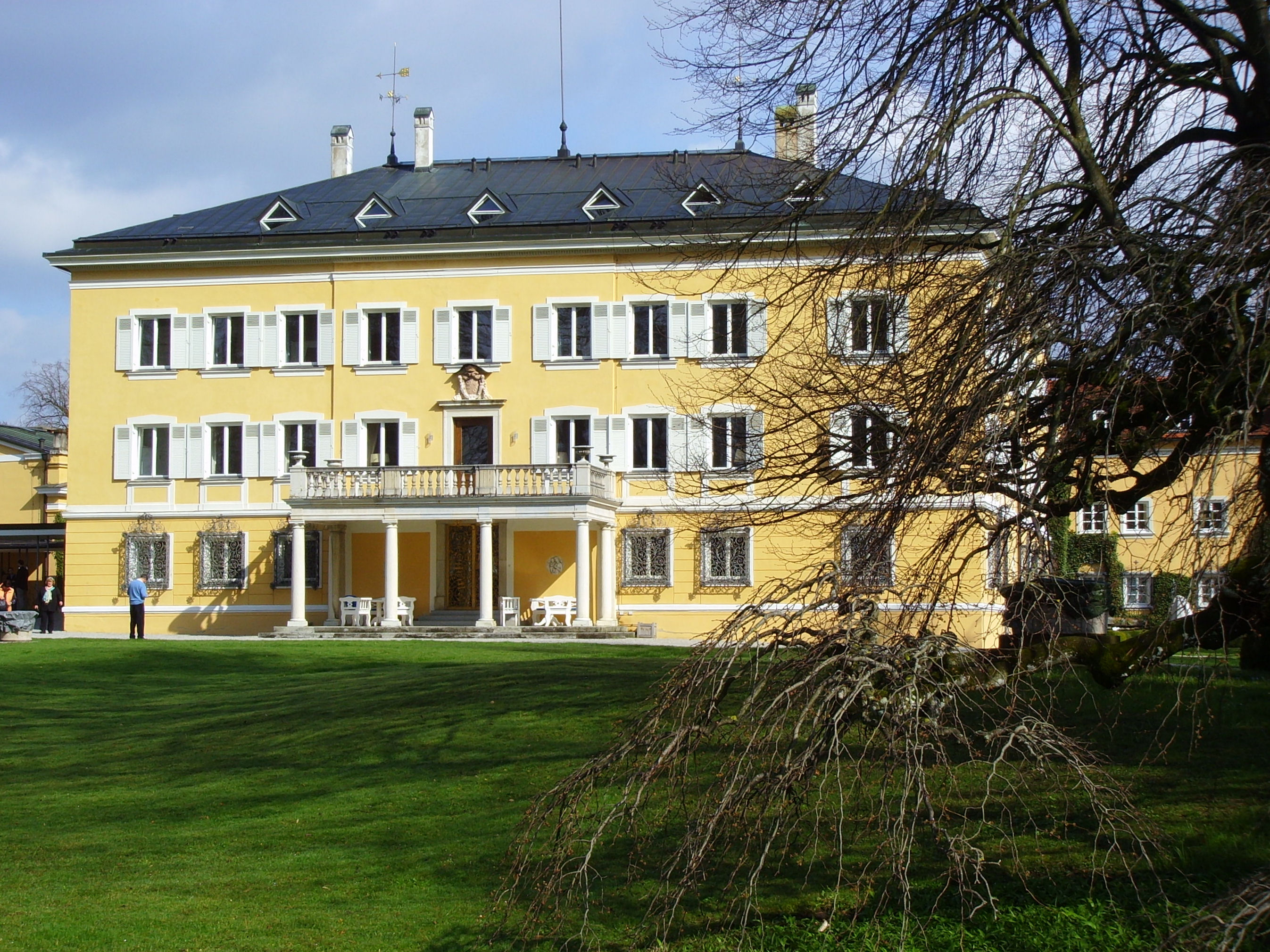 Schloss Tutzing, Sitz der Evangelischen Akademie. Blick vom Starnberger See zum Haupthaus